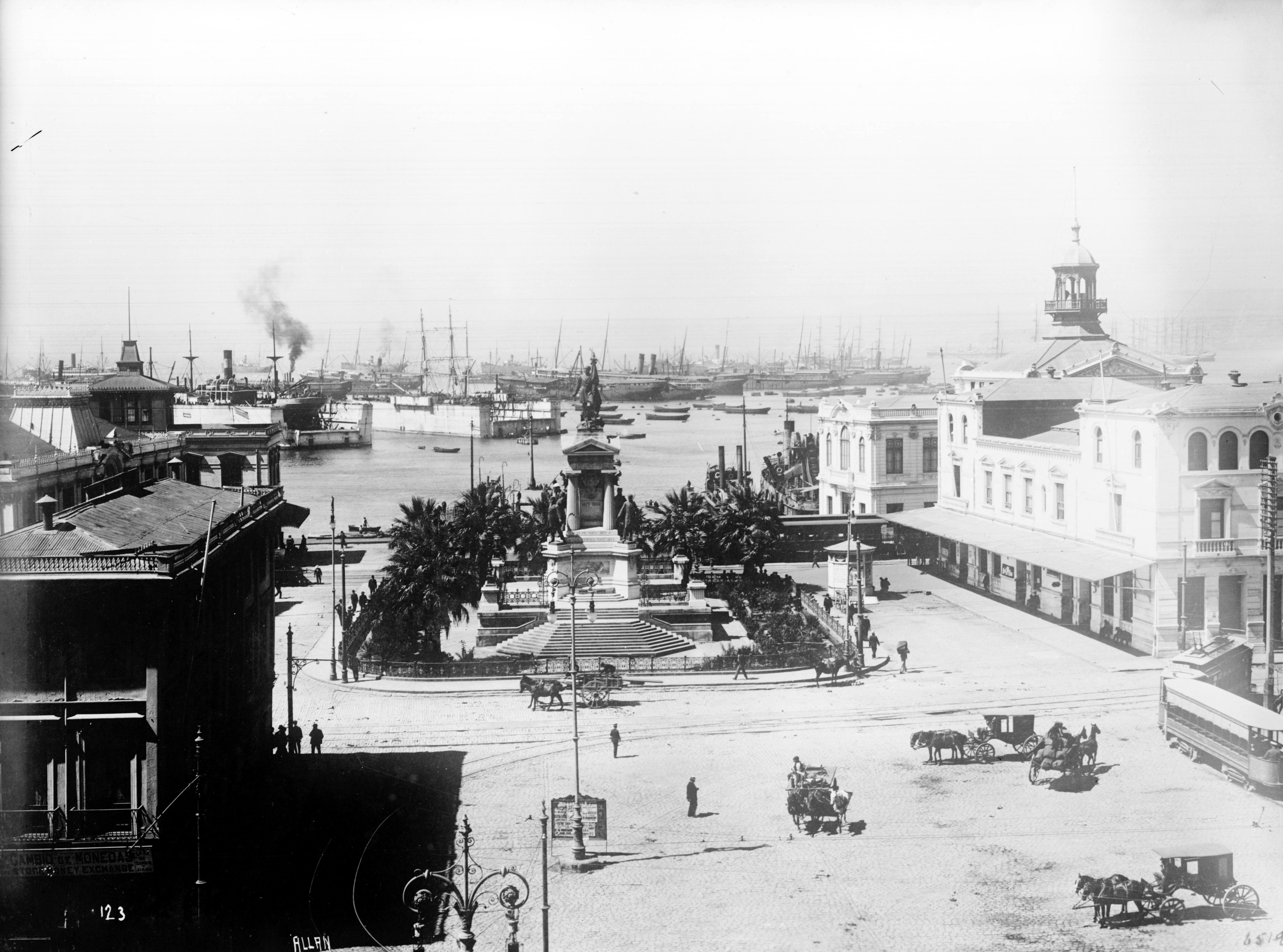 El Monumento a los Héroes de Iquique, llamado inicialmente Monumento a la Marina Nacional, está ubicado en el centro de la Plaza Sotomayor entre el Muelle Prat y el edificio de la Comandancia en Jefe de la Armada en la ciudad de Valparaíso, Chile. Este monumento fue eregido por erogación popular en memoria de los héroes navales que combatieron en los combates de Iquique y Punta Gruesa el 21 de mayo de 1879. Fue inaugurado el 21 de mayo de 1886.